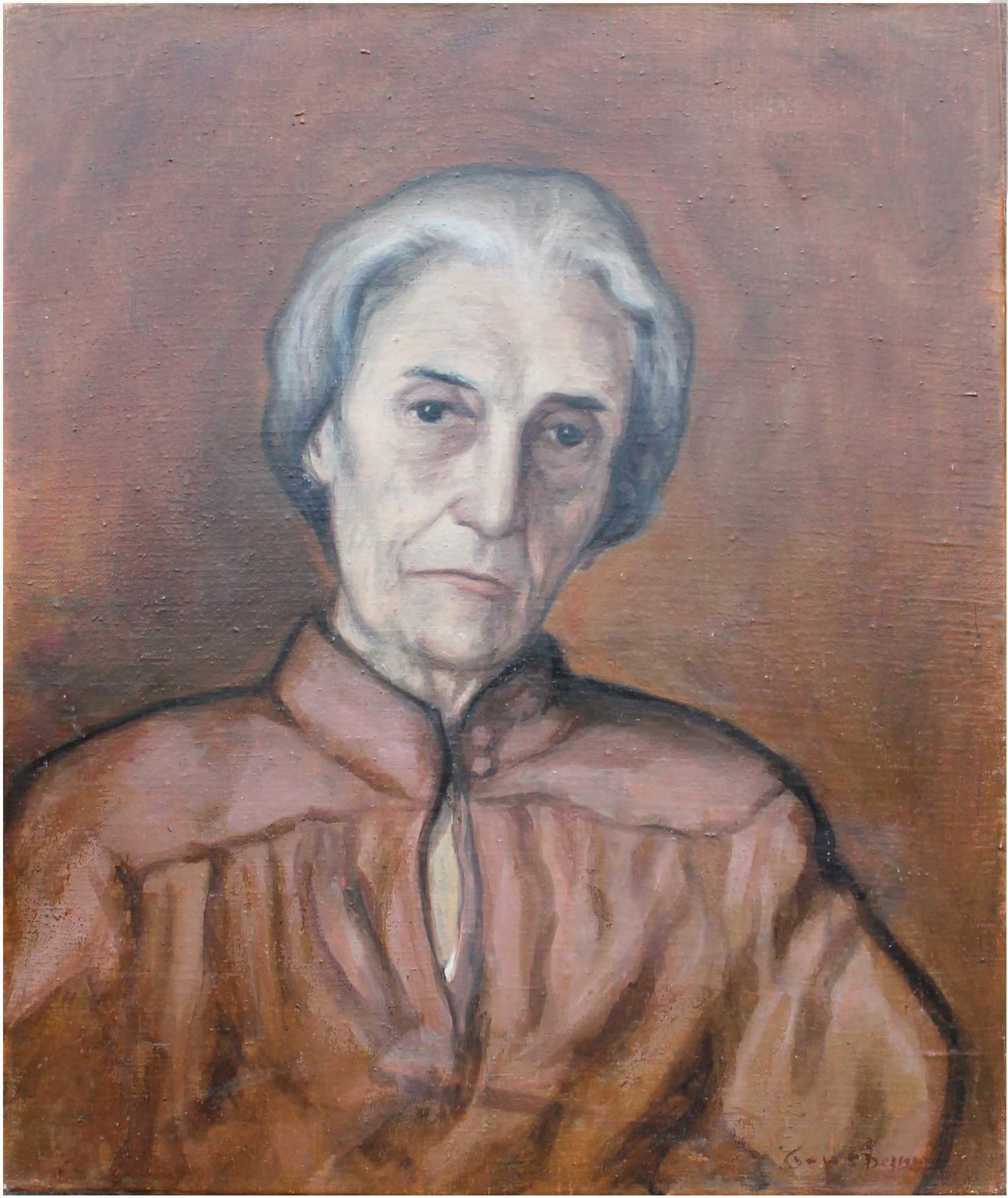 Martin Gensbaur, Porträt Ursula von Mangoldt, Öl/Lwd., 60 cm x 50 cm, 1980